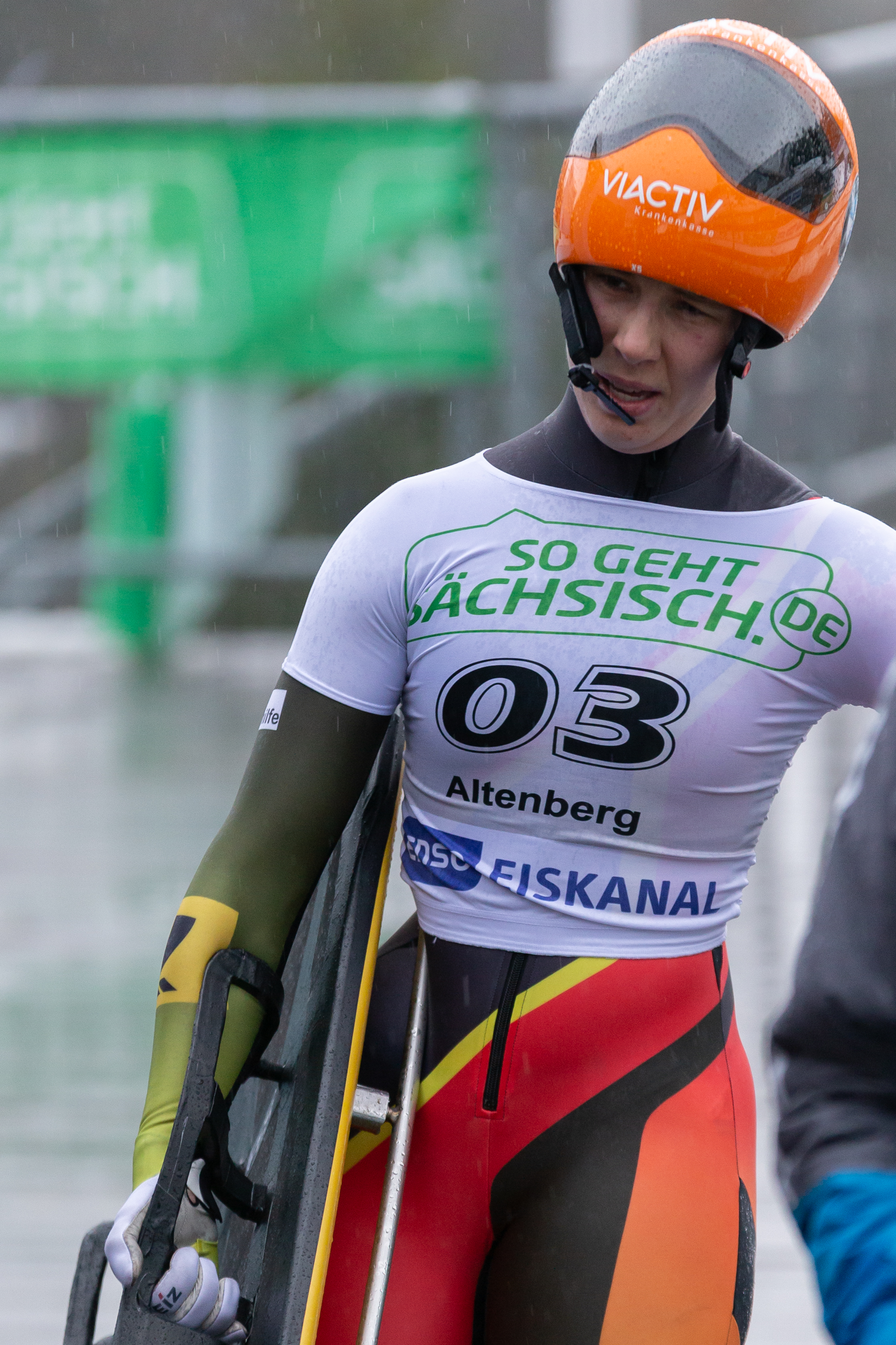 Deutsche Meisterschaften Skeleton; Sophia Griebel (RT Suhl) im Ziel; Drittplatzierter, Bronzemedaille, bronze medal